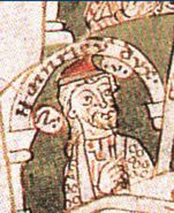 Jindřich Lev